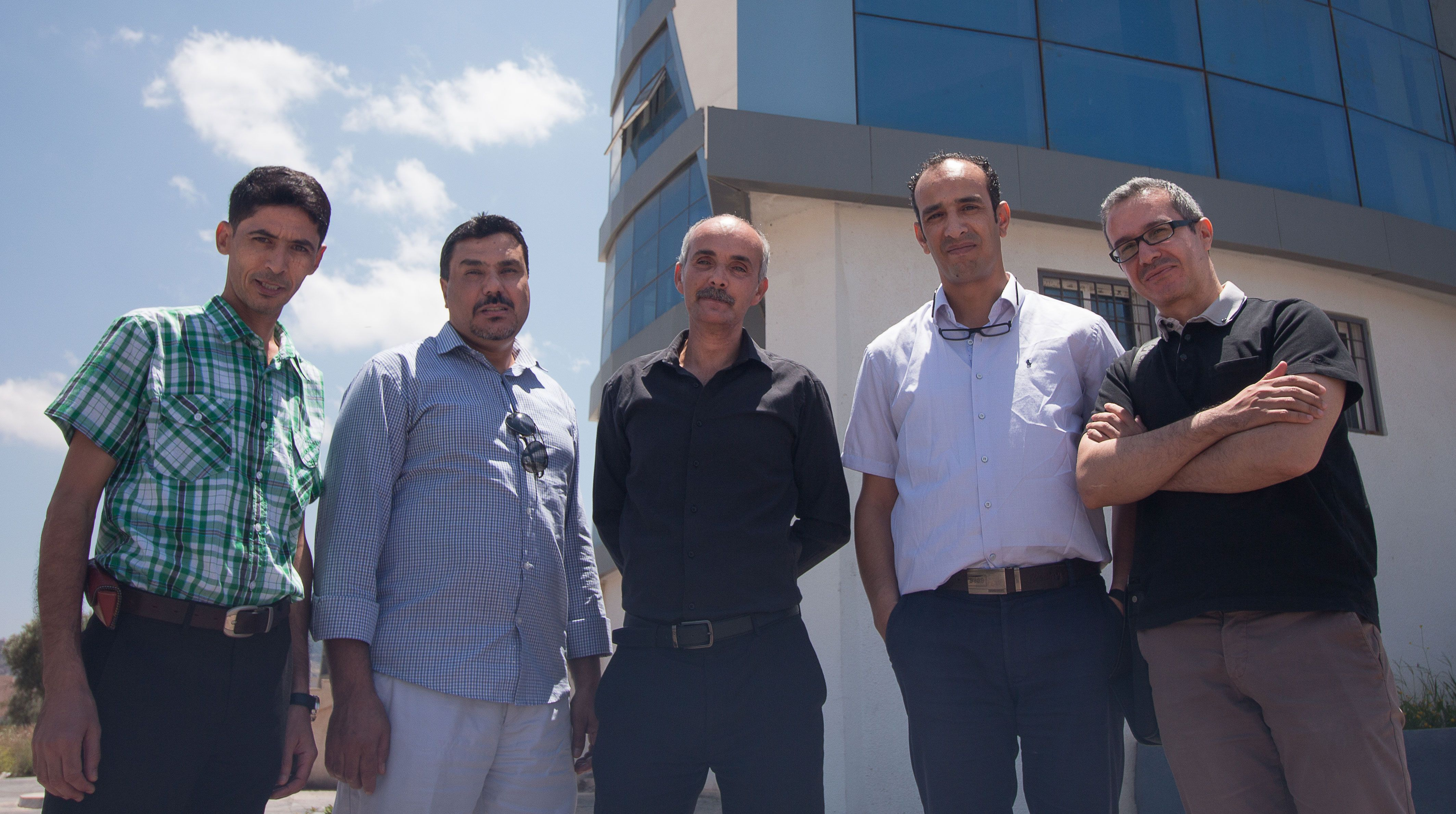 صورة تجمع رؤساء فرق البحث لمخبر الفينومينولوجيا وتطبيقاتها بجامعة أبي بكر بلقايد تلمسان